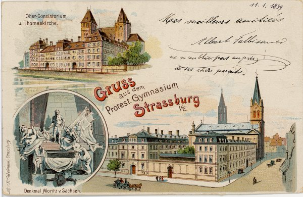 Carte postale de Strasbourg avec comme légende "Baisers du Gymnase protestant de Strasbourg".